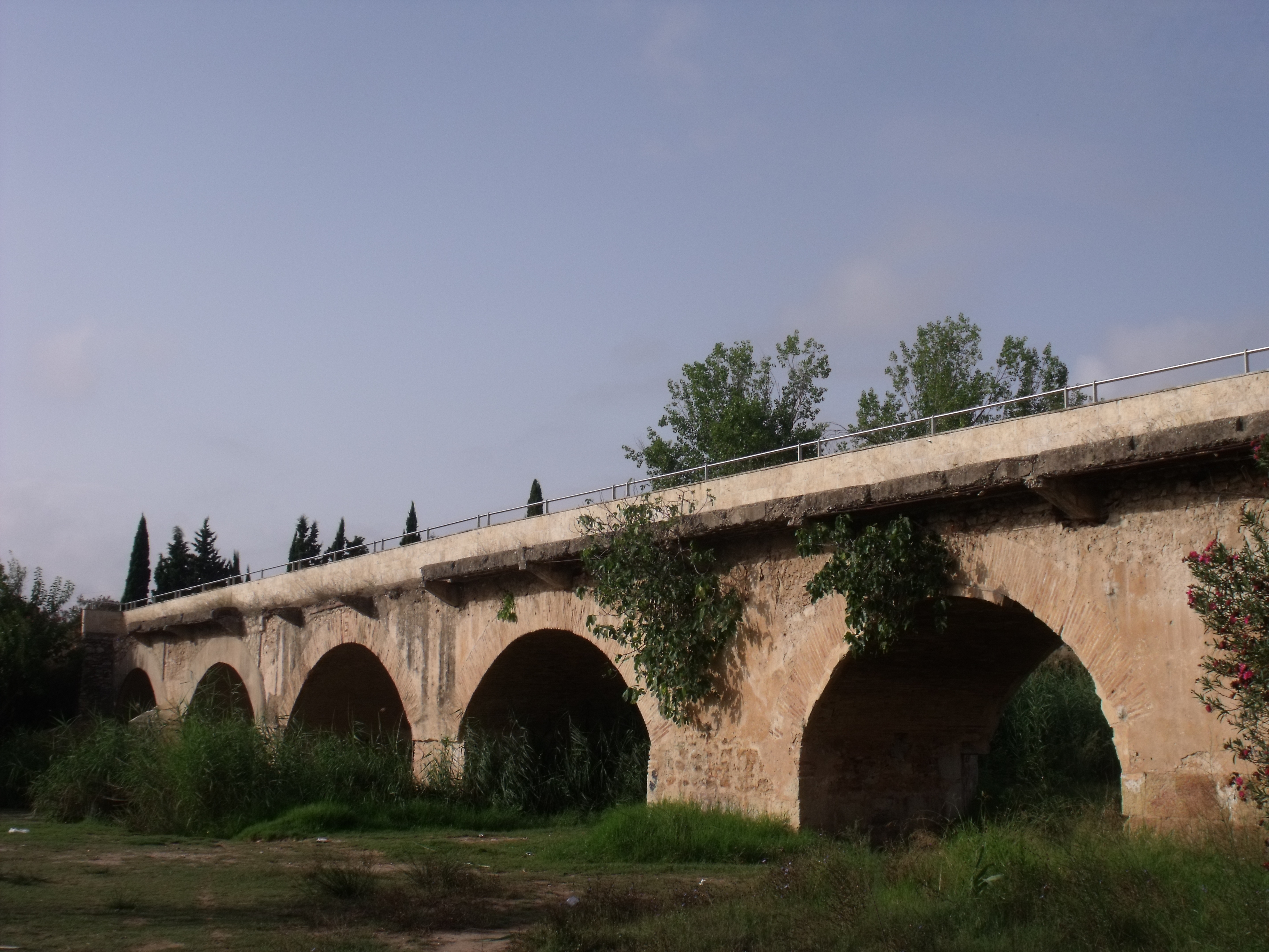 detalle del puente viejo sobre el Turia en Ribarroja